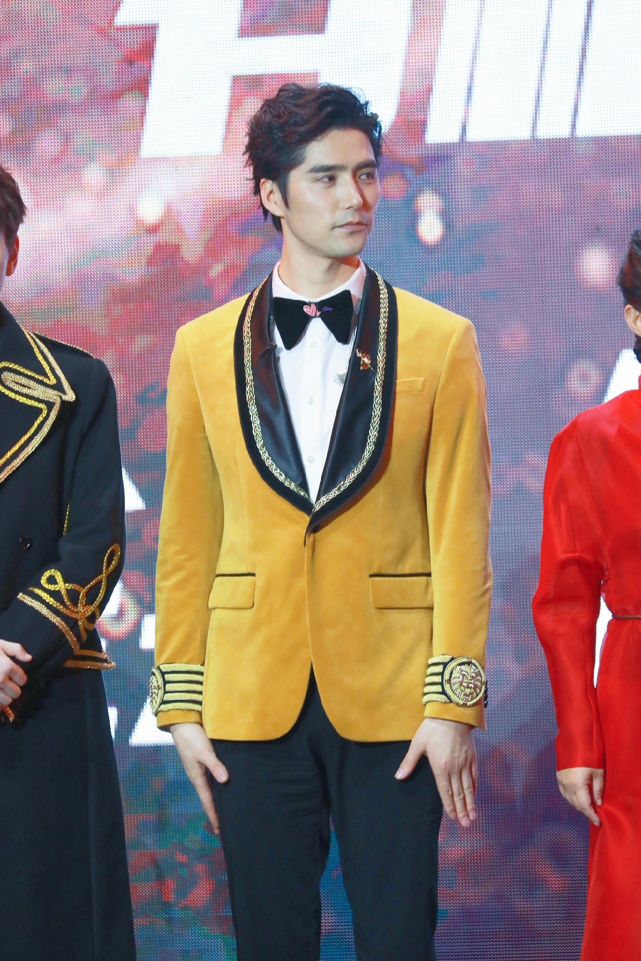 中文（中国大陆）: 2019年4月12日，阿云嘎、蔡程昱等人出席《歌手2019》总决赛见面会。